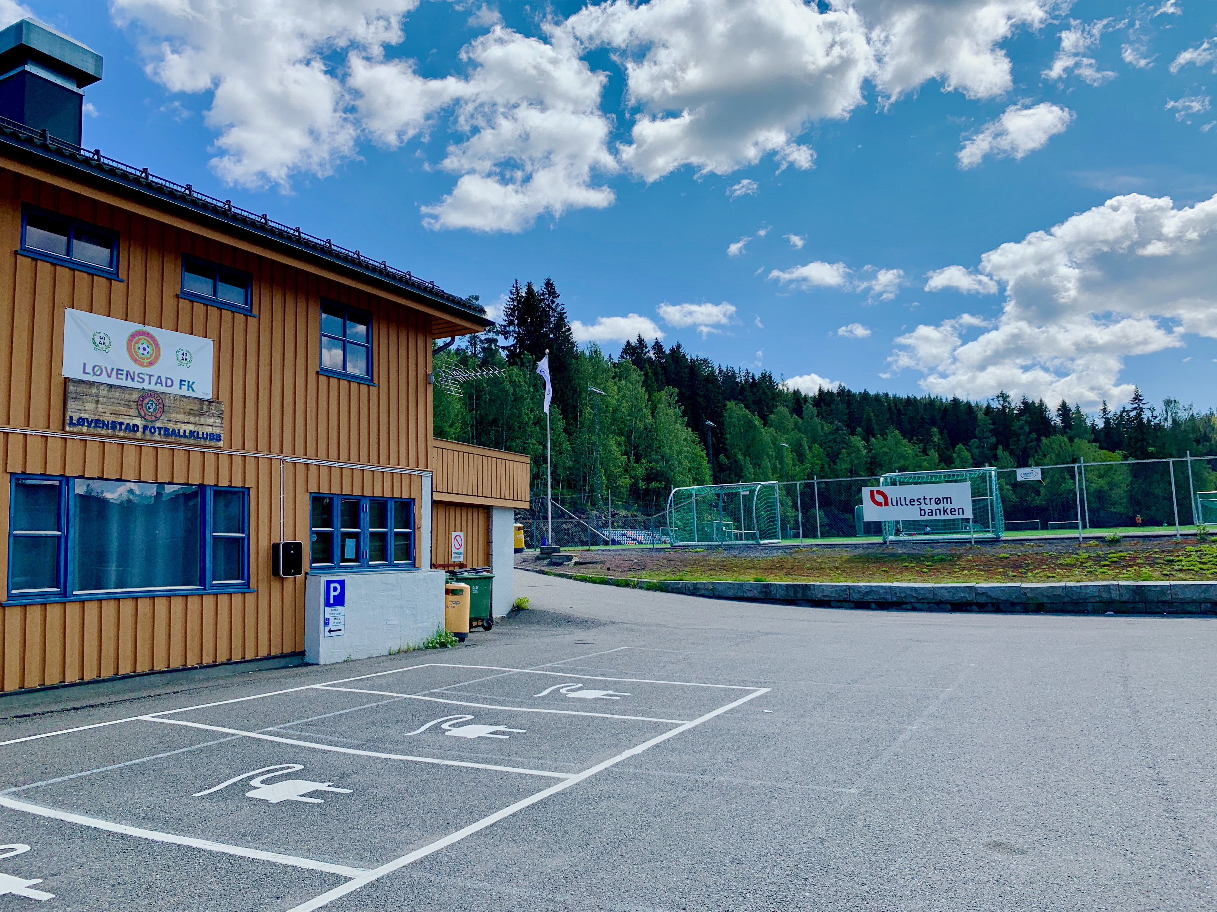 Løvenstad Fotballklubb, Rælingen.